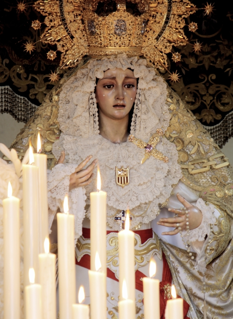 Virgen de La Merced